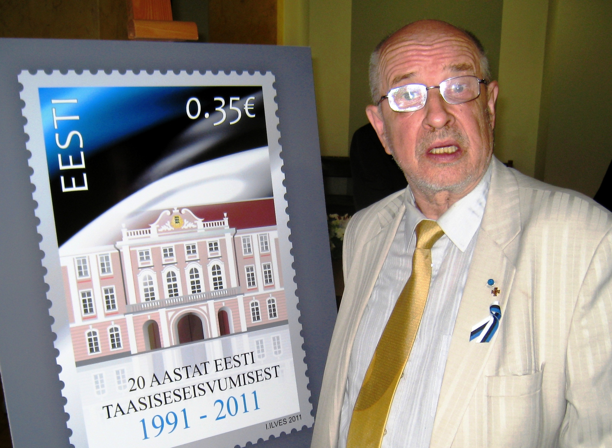 Teet Kallas